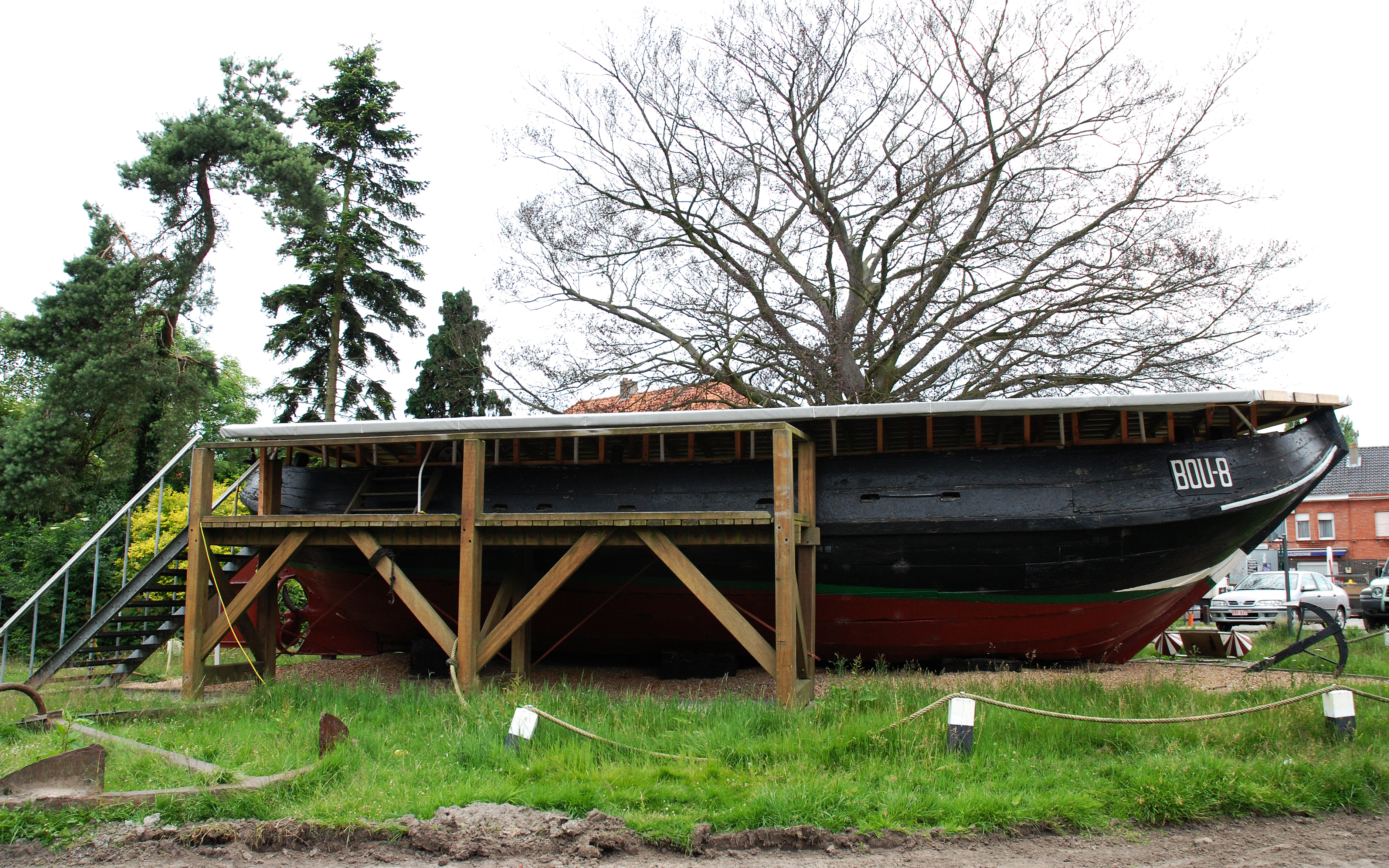 De Bou-8, een lemmerhengst in Boekhoute, België